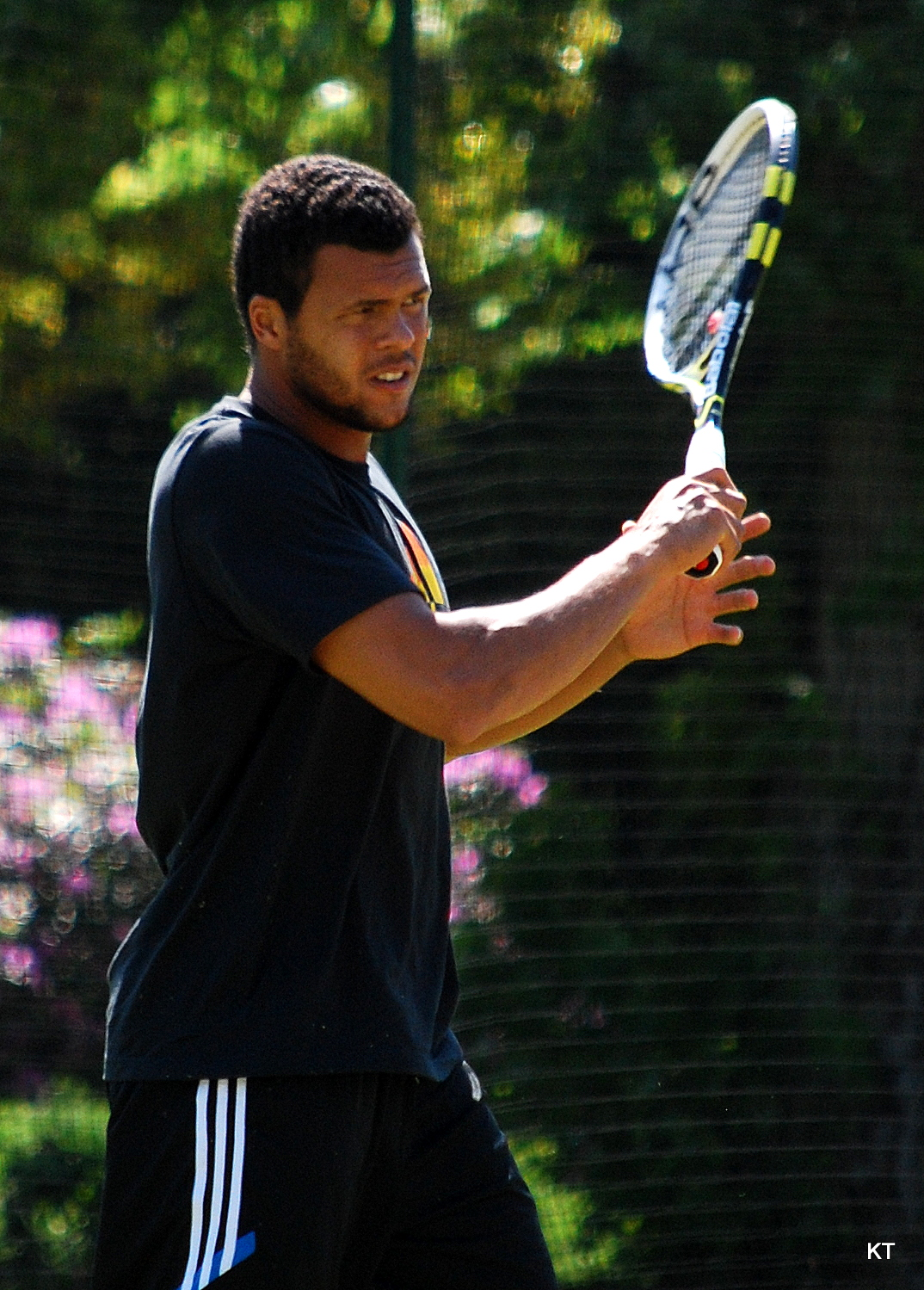 Stoke Park, June 2010.